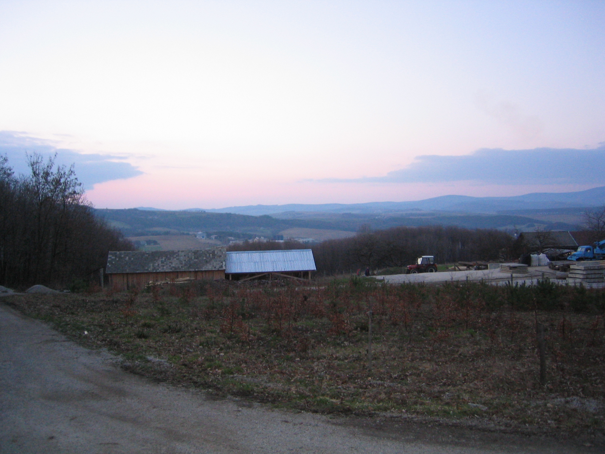 Bild über Jablonka Slowakei